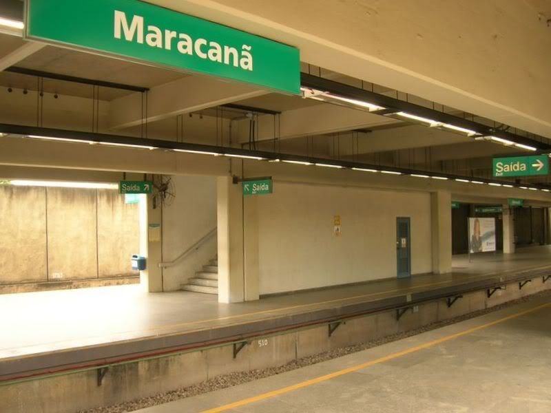 Estação Maracanã do Metrô Rio